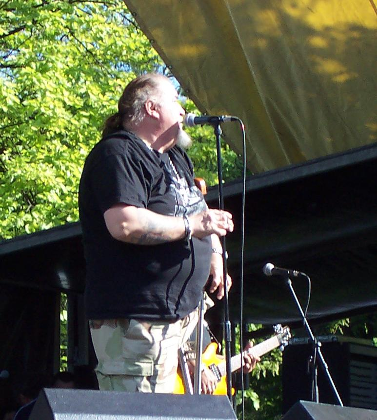 Deák Bill Gyula a Tabánban